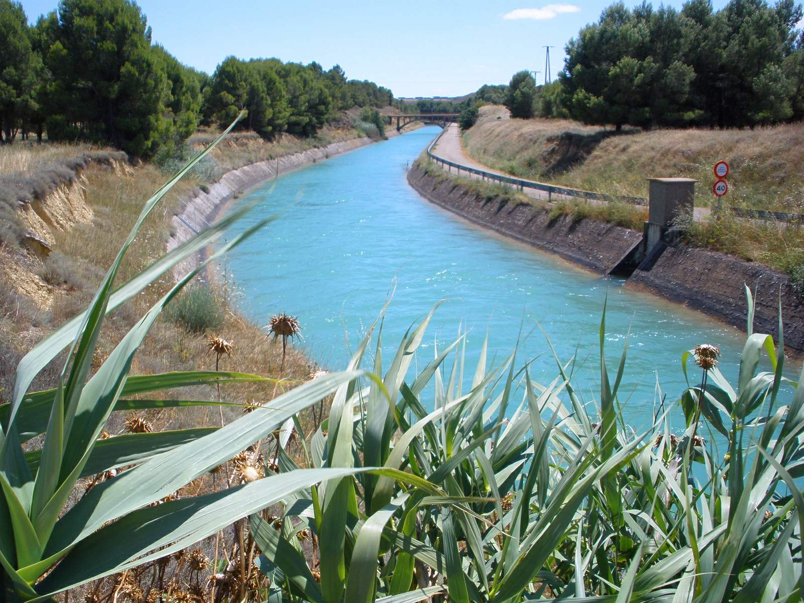 Canal de Bardenas, en las cercanías de Sádaba (Zaragoza, Aragón, España)